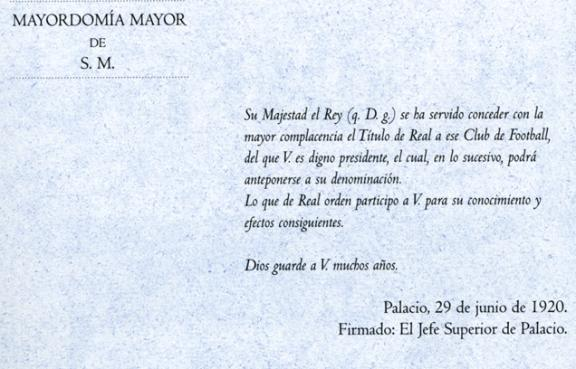 Misiva que concedió SM al Real Madrid en 1920. Título de Real